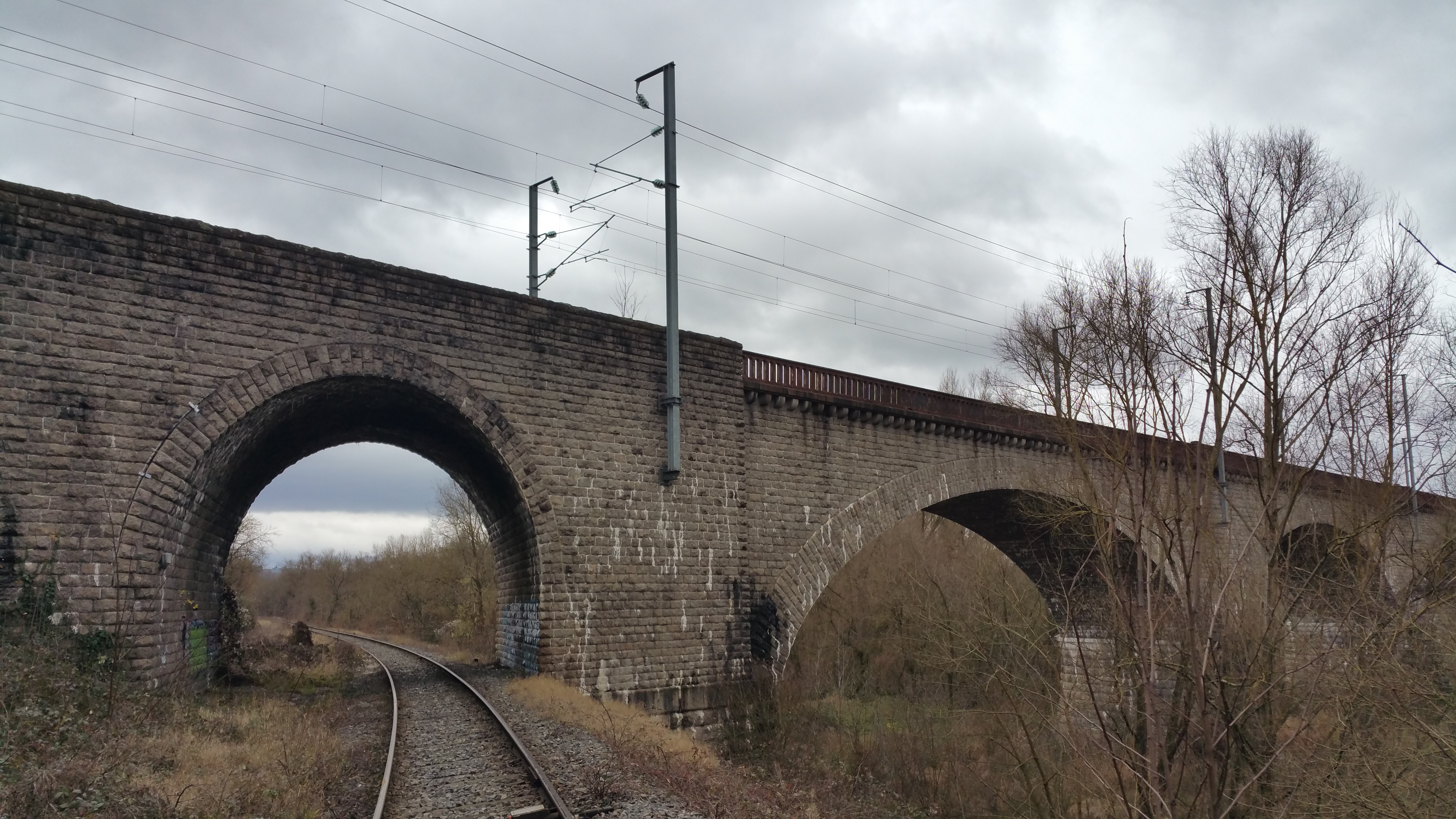 Viaduc d'Abrest franchissant l'Allier et portant la ligne Paris - Clermont-Ferrand. Sous la première arche, coté rive droite (Abrest) passe la voie ferrée de Saint-Germain-des-Fossés à Darsac.